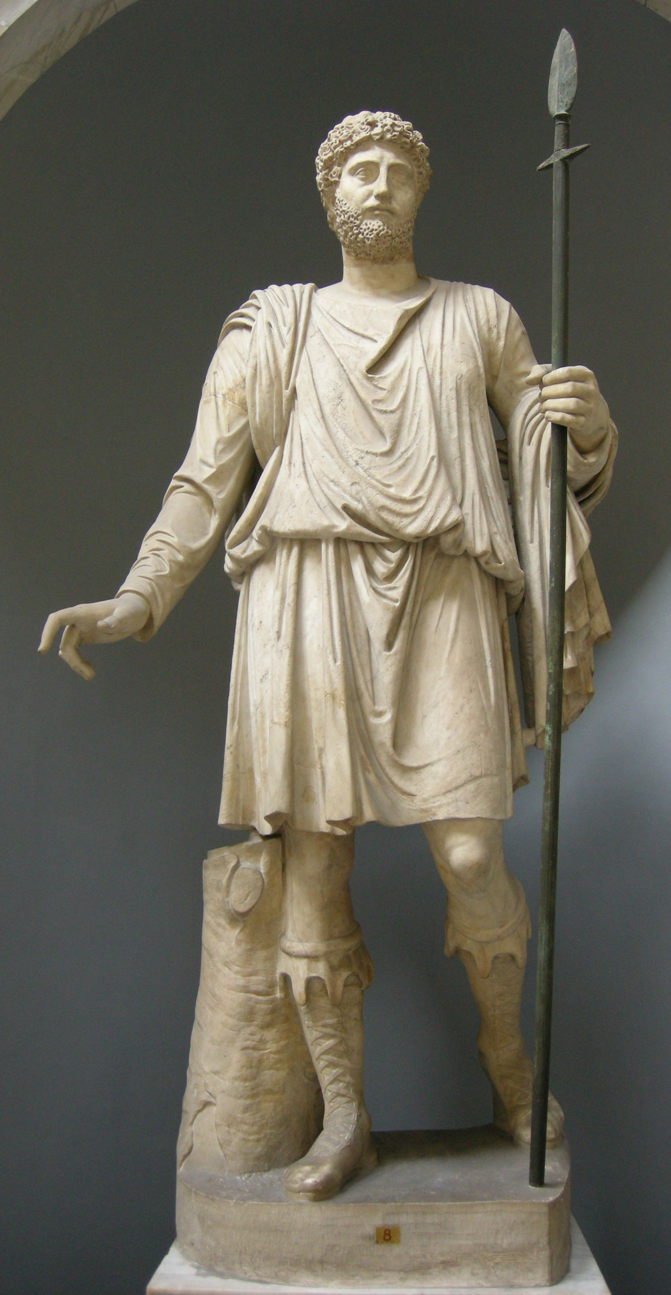 Statua di cacciatore, testa non pertinente con ritratto di età antonina inv. 2294